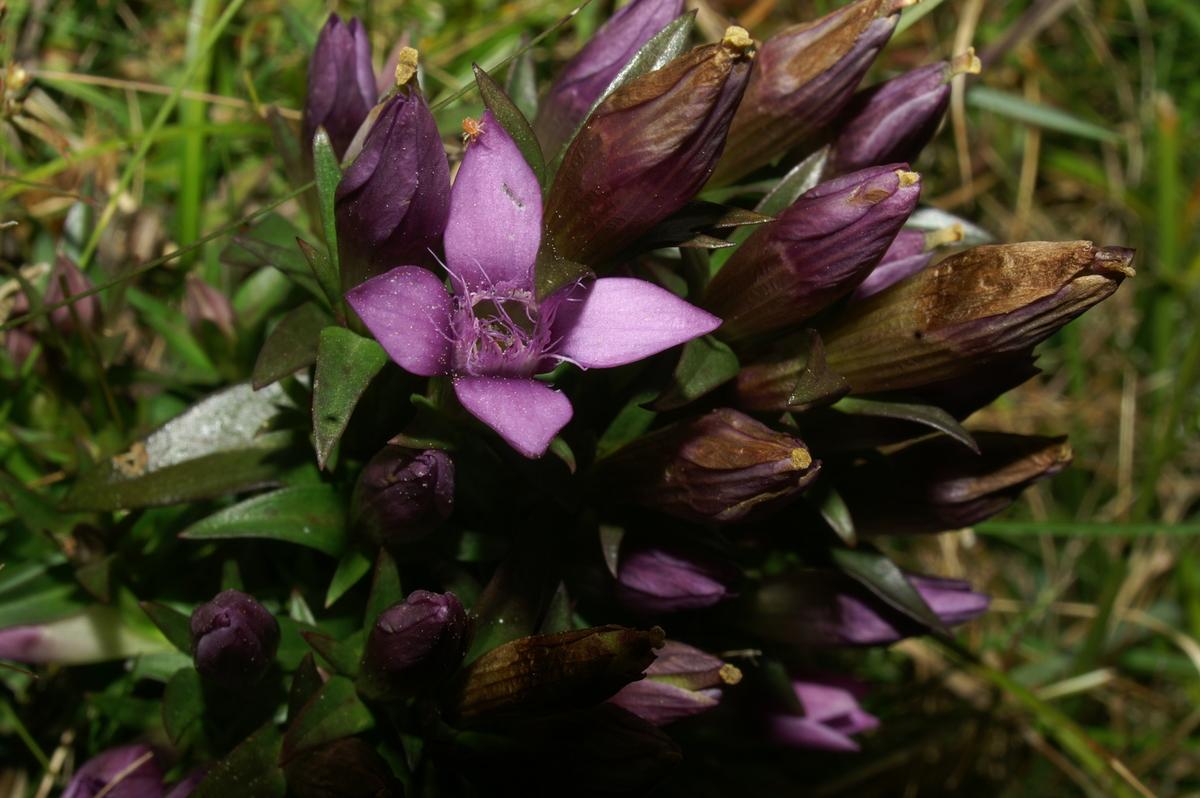 Čašasti sviščevec v Podkraju.